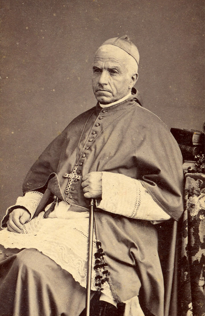 Monseñor Valerio Antonio Jiménez Hoyos, nacido en Marinilla el 29 de enero de 1806; y quien mas adelante tomaría posesión el 8 de diciembre de 1868 como primer obispo de Medellín y Antioquia y primer obispo nacido en Marinilla (Ant) en donde murió en diciembre de 1891.